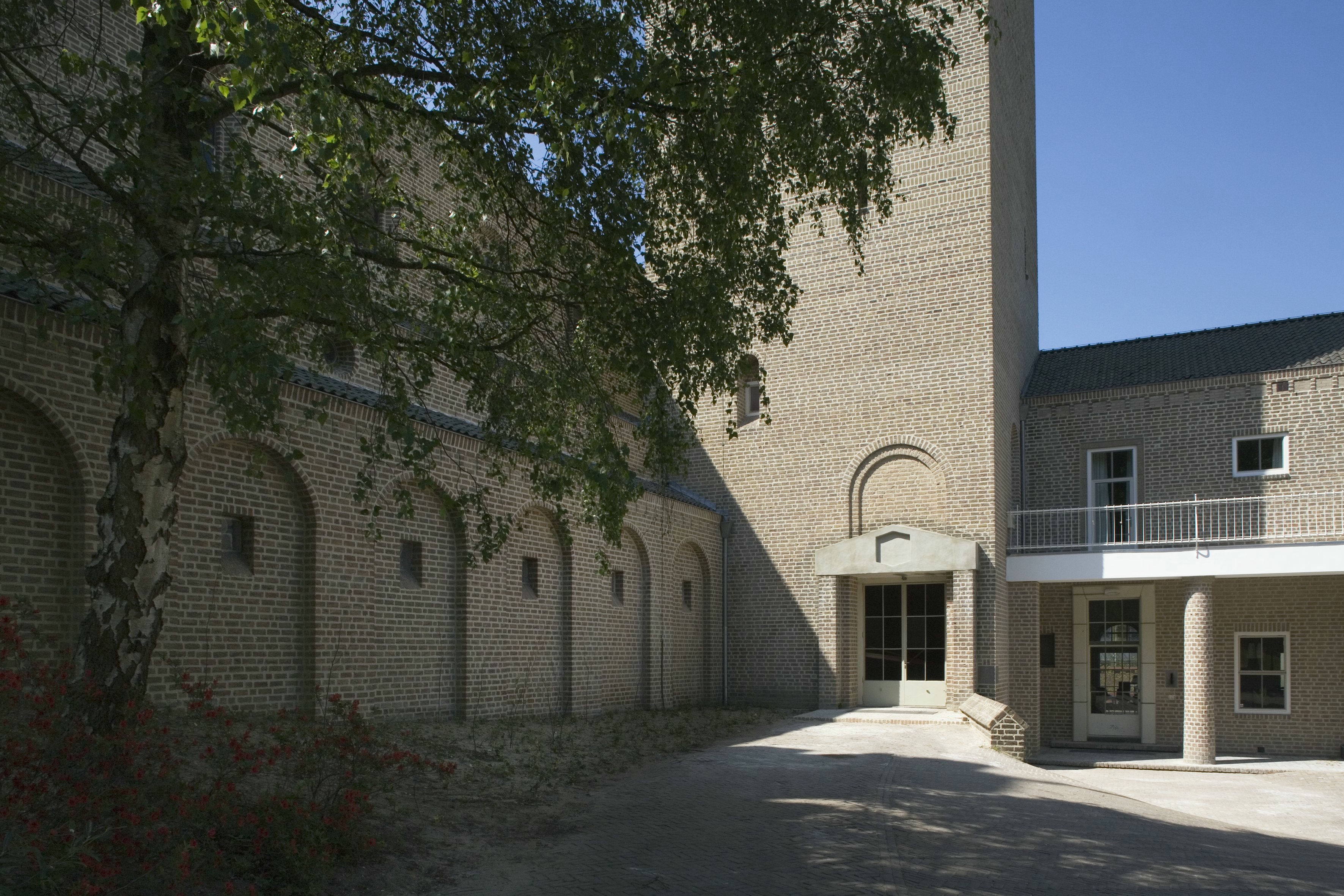 Rooms-Katholieke Kapel Van De Paters Kruisheren: Zicht op entree aan de binnenplaats